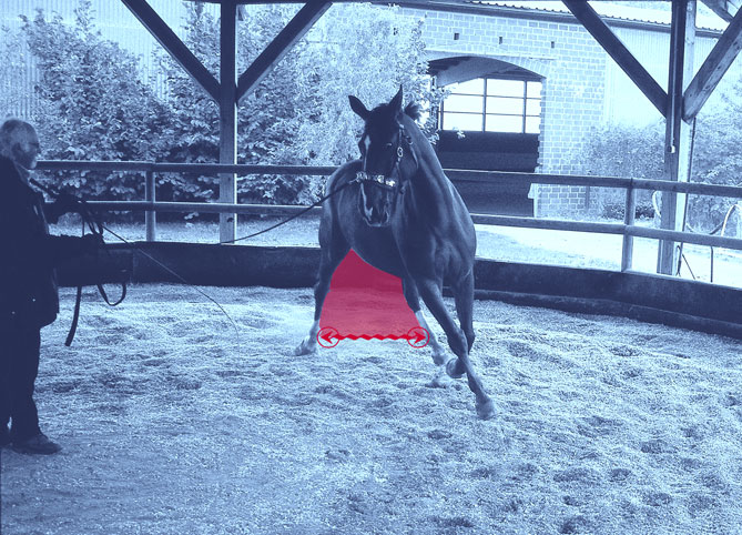 Scherkraft wirkt auf die Hinterhand.